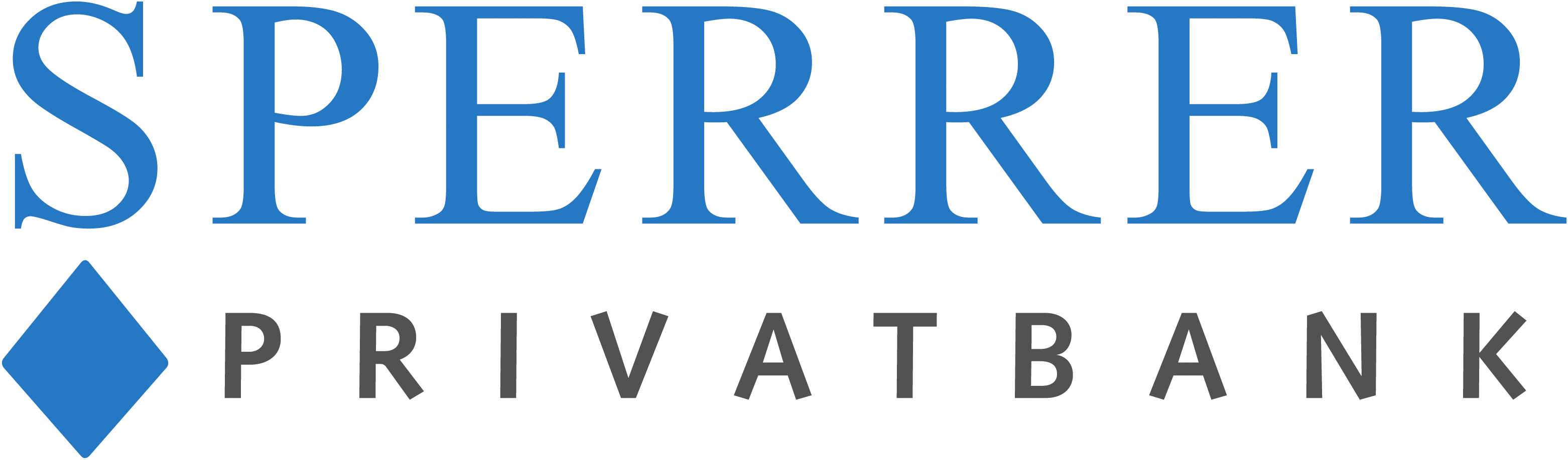 Logo des Bankhauses Ludwig Sperrer KG